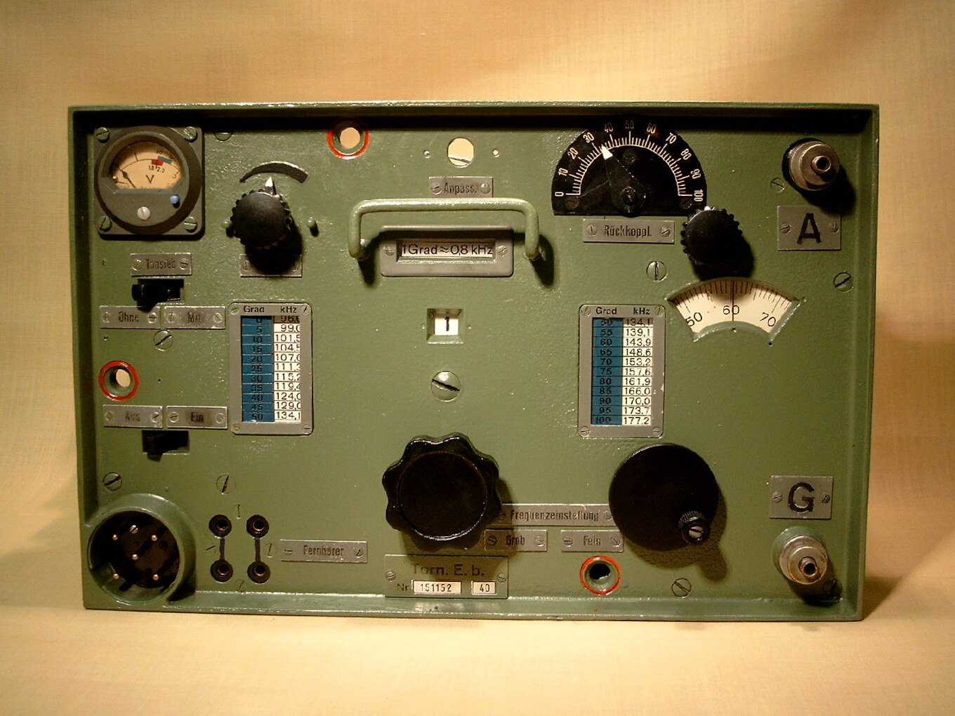 Frontansicht des Tornister-Empfängers-Berta